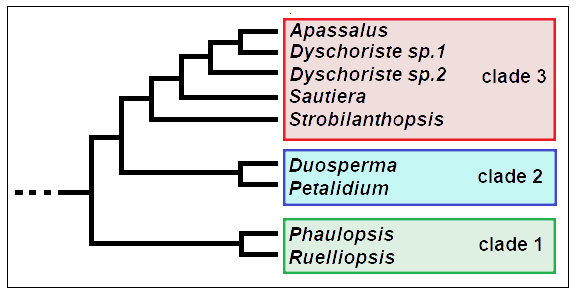 Cladogramma_della_sottotribù Petalidiinae (Acanthaceae)